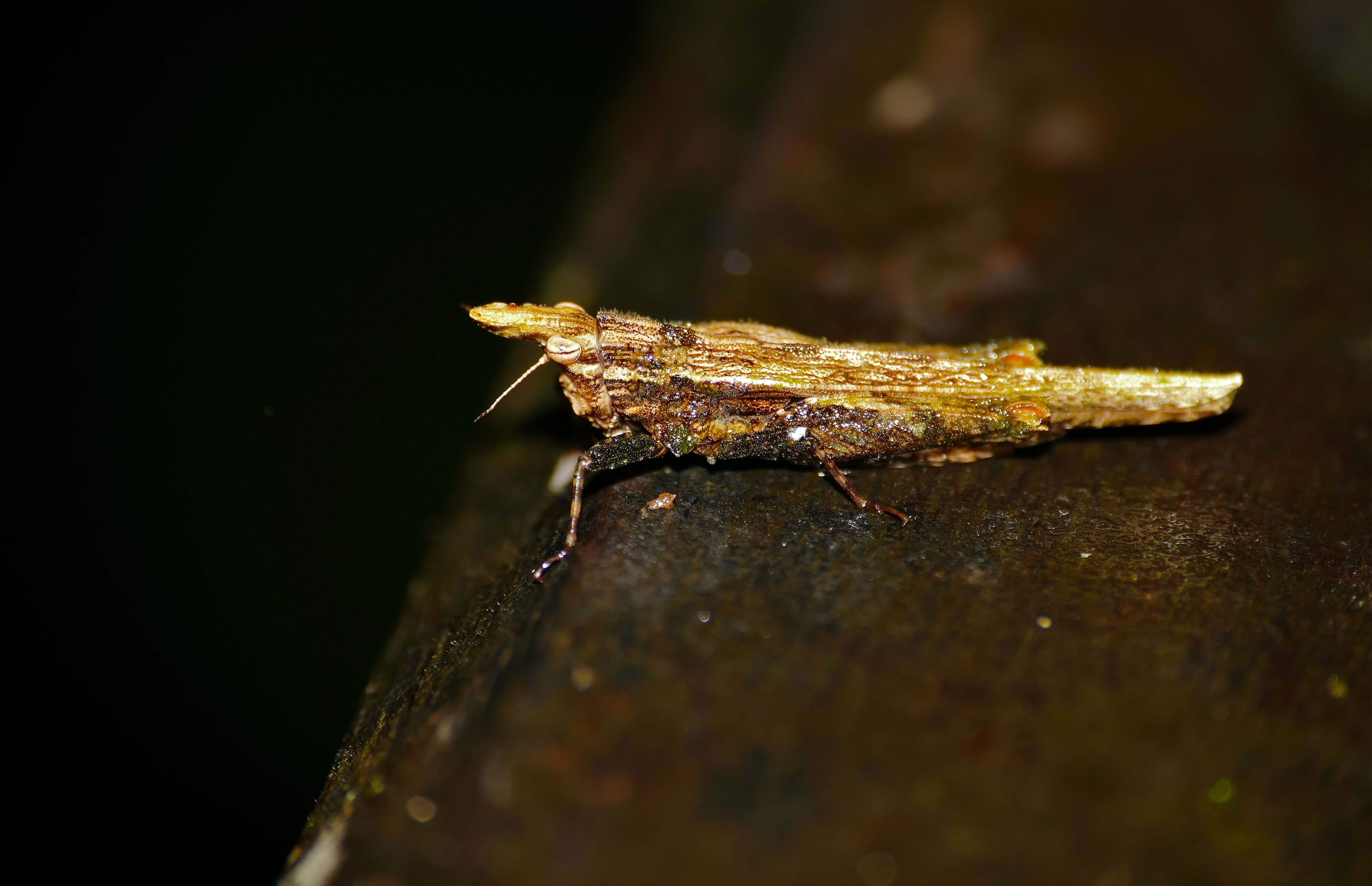 Mulu NP, Sarawak, MALAYSIA